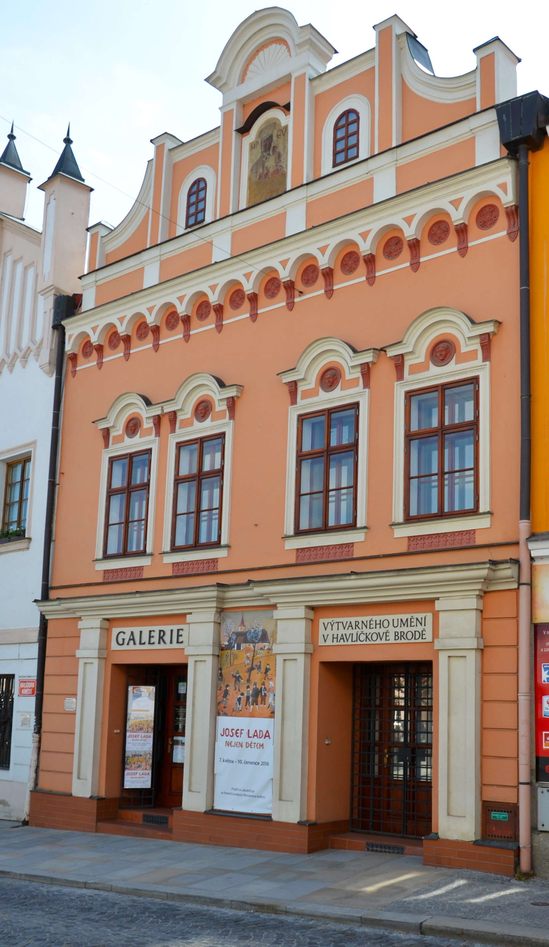 Havlíčkův Brod, Havlíčkovo náměstí čp. 18, Chmeldovský dům, Galerie výtvarného umění.